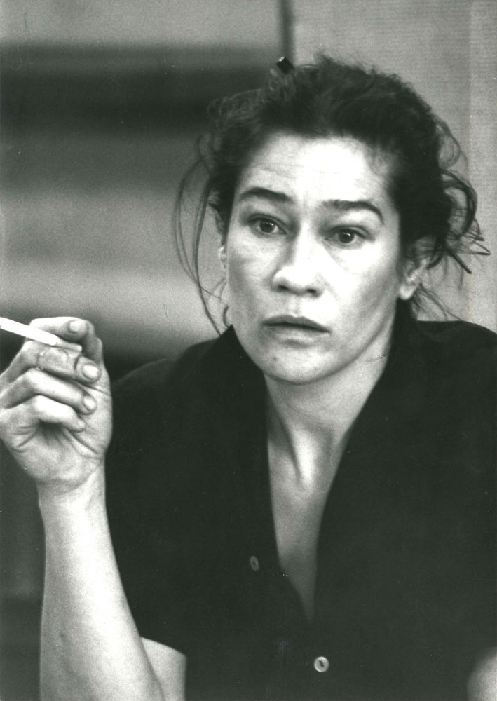 Die Schauspielerin Tina Engel in der Aufnahme des Berliner Fotografen Werner Bethsold.